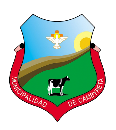 Lo que hay aqui es el escudo de cambyreta extraido de la web el cual le quite su fondo para evitar problemas al colocarlo